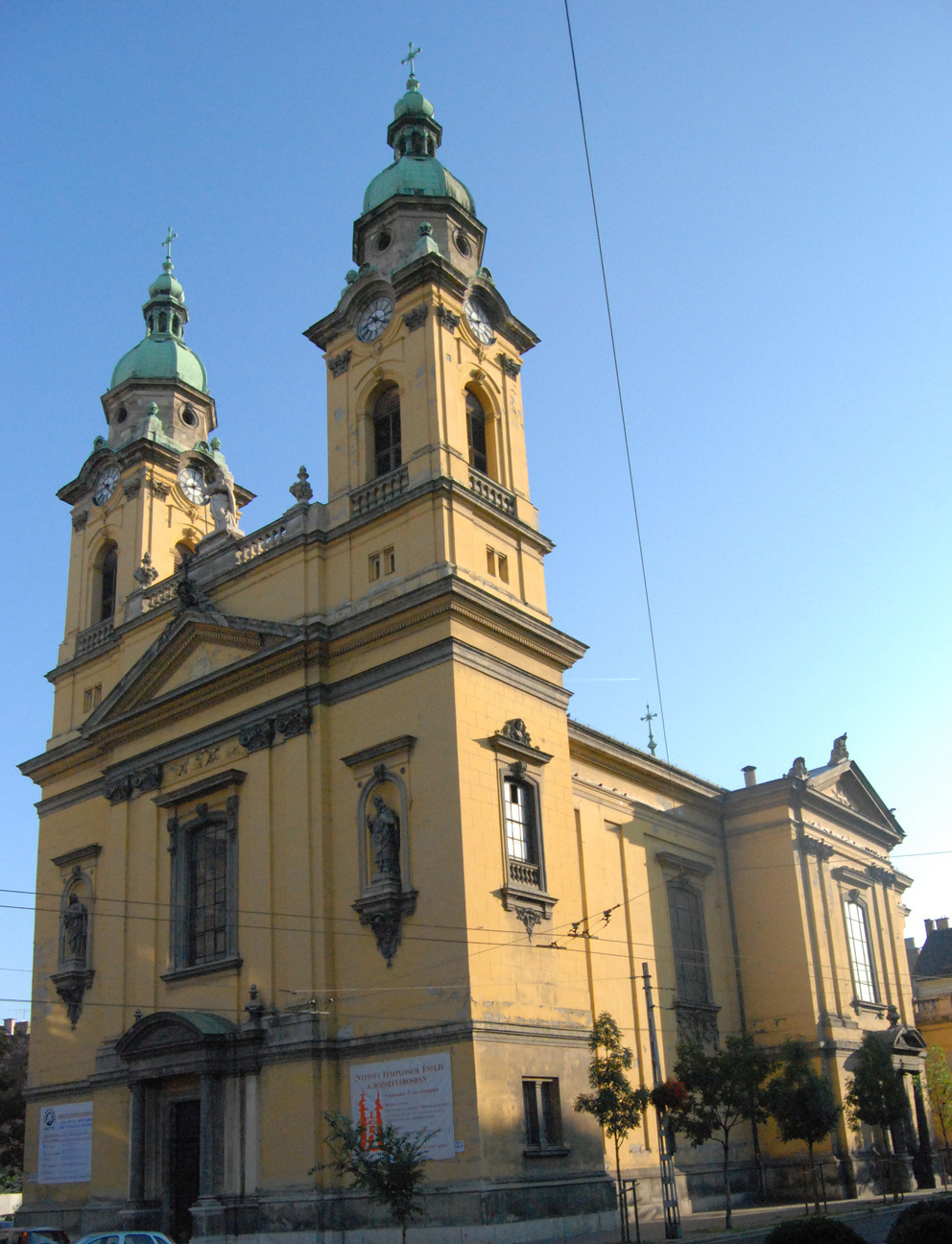 Józsefvárosi r.k. templom (Budapest 8, Horváth Mihály tér) This is a photo of a monument in Hungary, Identifier: 916